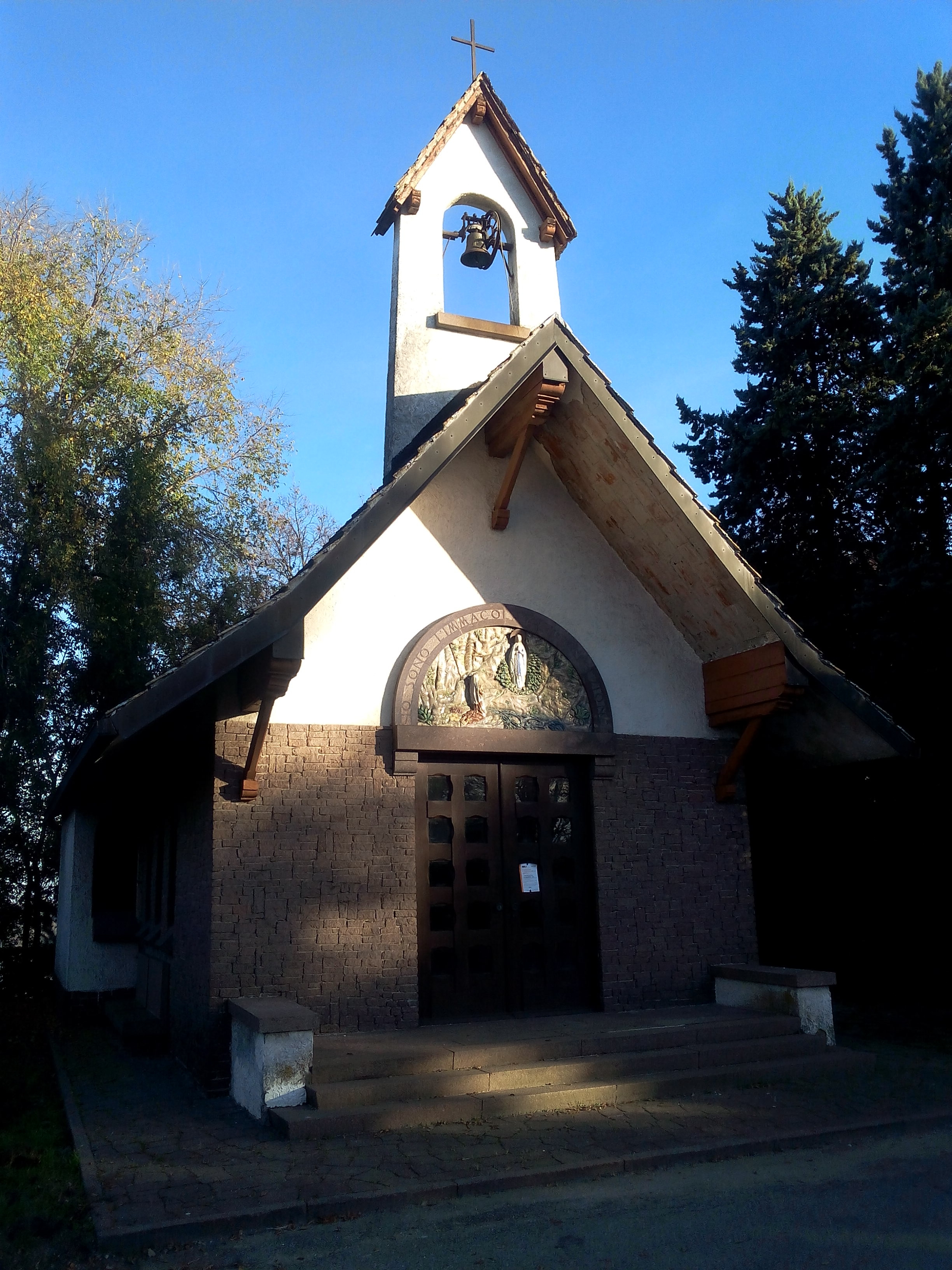 Colle dell'Eremo (Torino): la chiesetta presso i ripetitori